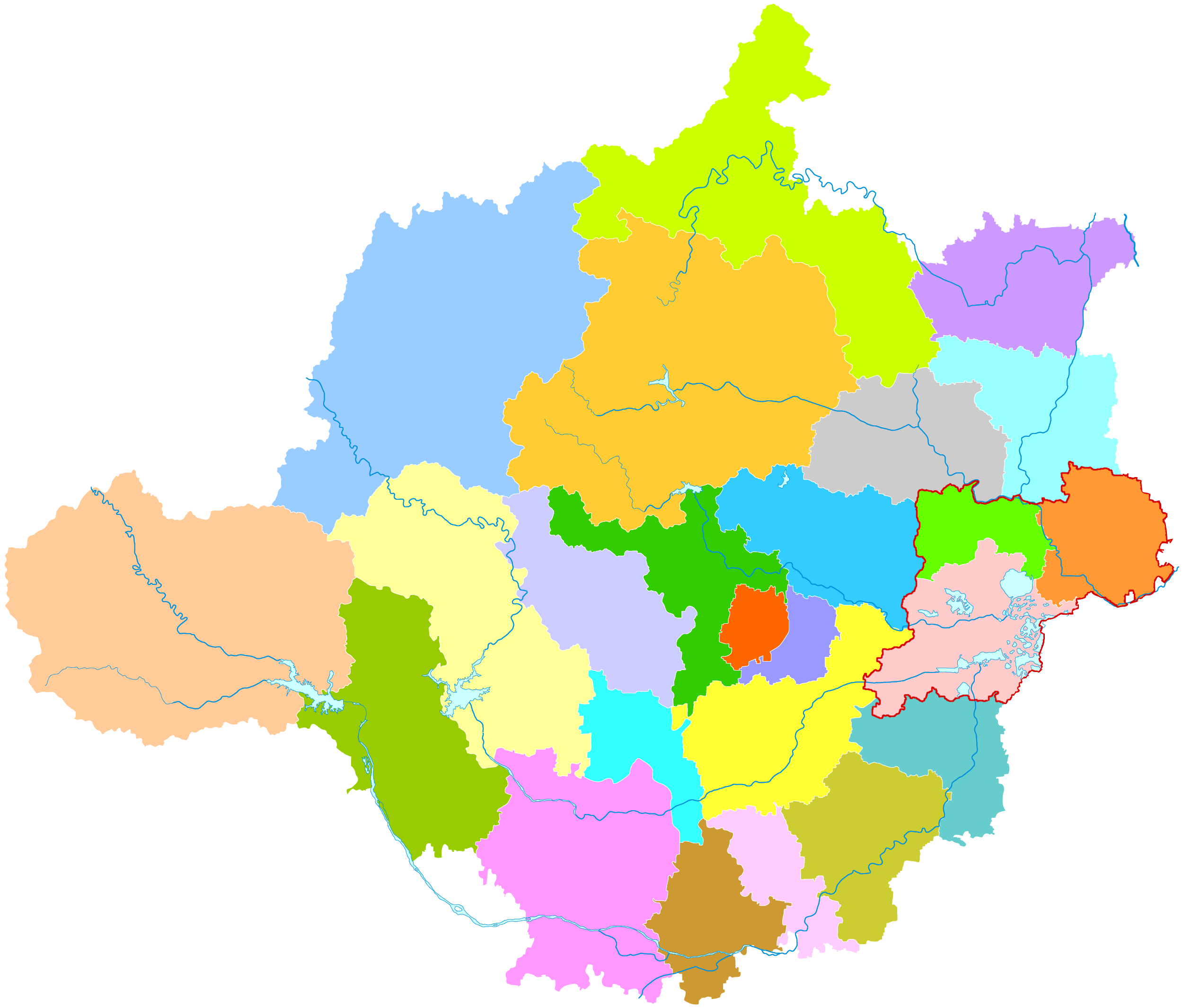 中文（中国大陆）: 雄县（①）、安新县（②）、容城县（③）在河北省保定市的位置